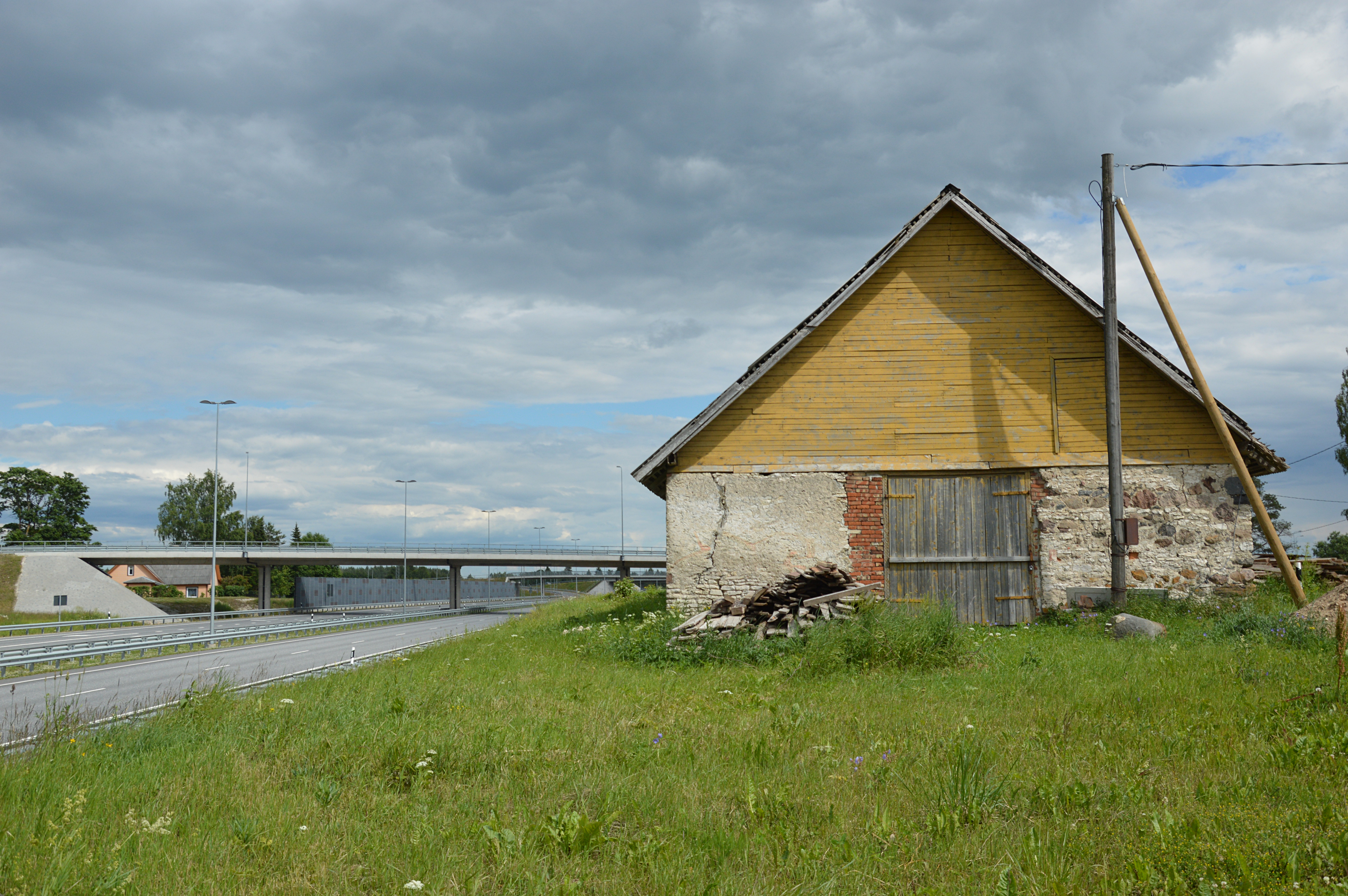 Kuivajõe kõrtsihoone